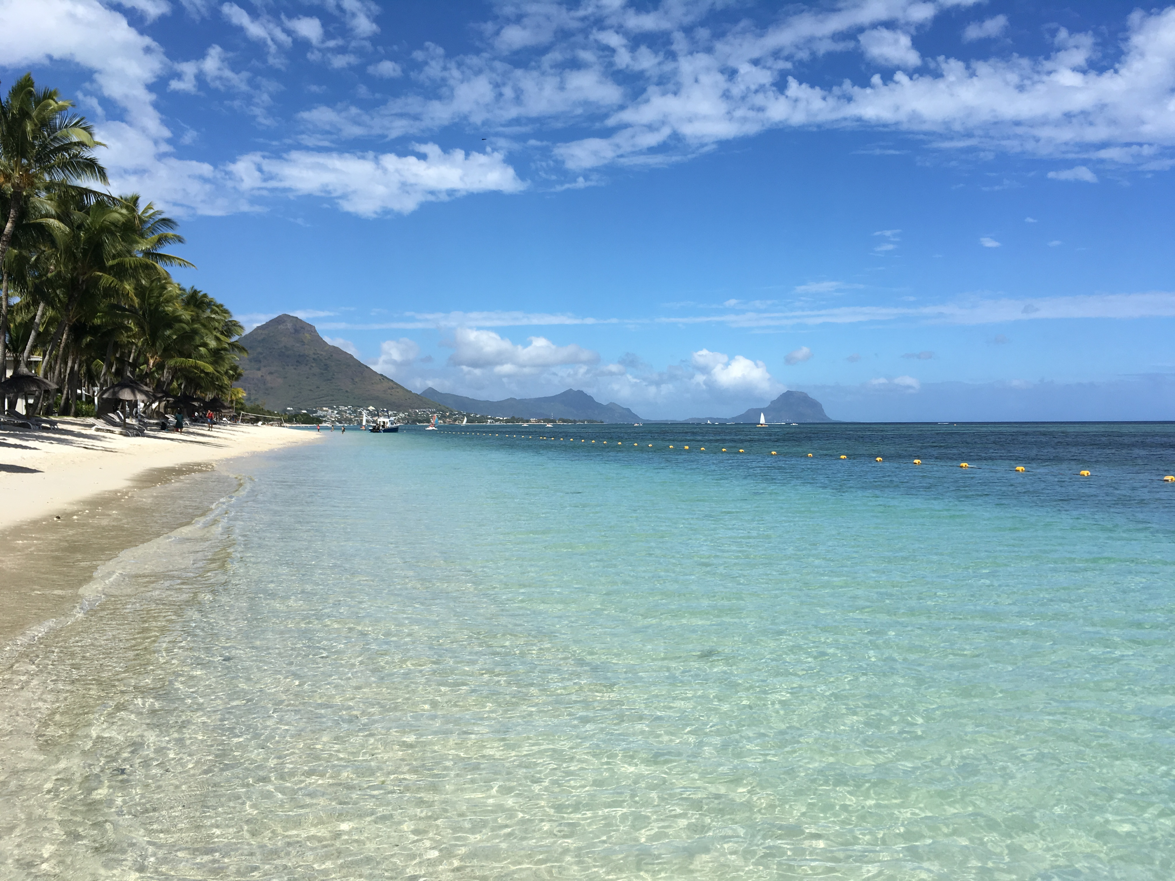 Flic-en-Flac, île Maurice.